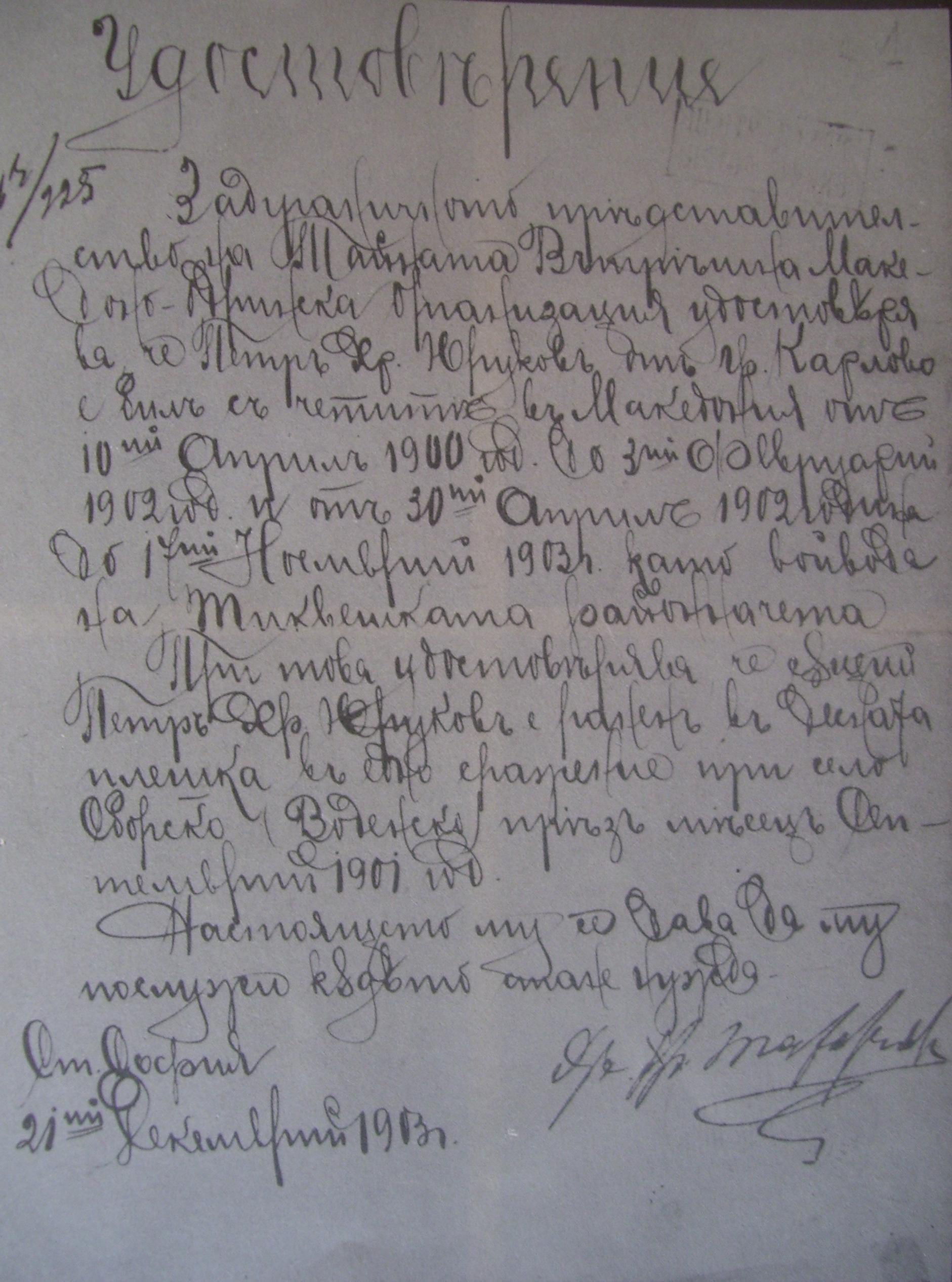 Удостоверение от Задграничното представителство на ВМОРО на Петър Юруков. Текстът долу е предаден със съвременен правопис. "Удостоверение Задграничното представителство на Тайната вътрешна македоно-одринска революционна организация удостоверява, че Петър Хр. Юруков от гр. Карлово е бил с четите в Македония от 10 април 1900 год. до 3 февруари 1902 год. и от 30 април 1902 година до 17 ноември 1903 г. като войвода на Тиквешката районна чета. При това удостоверява, че същий Петър Хр. Юруков е ранен в дясната плешка в едно сражение при село Сборско, Воденско през месец септември 1901 год. Настоящето му се дава да му послужи, където стане нужда. София 21 декември 1903 Д-р Христо Татарчев"